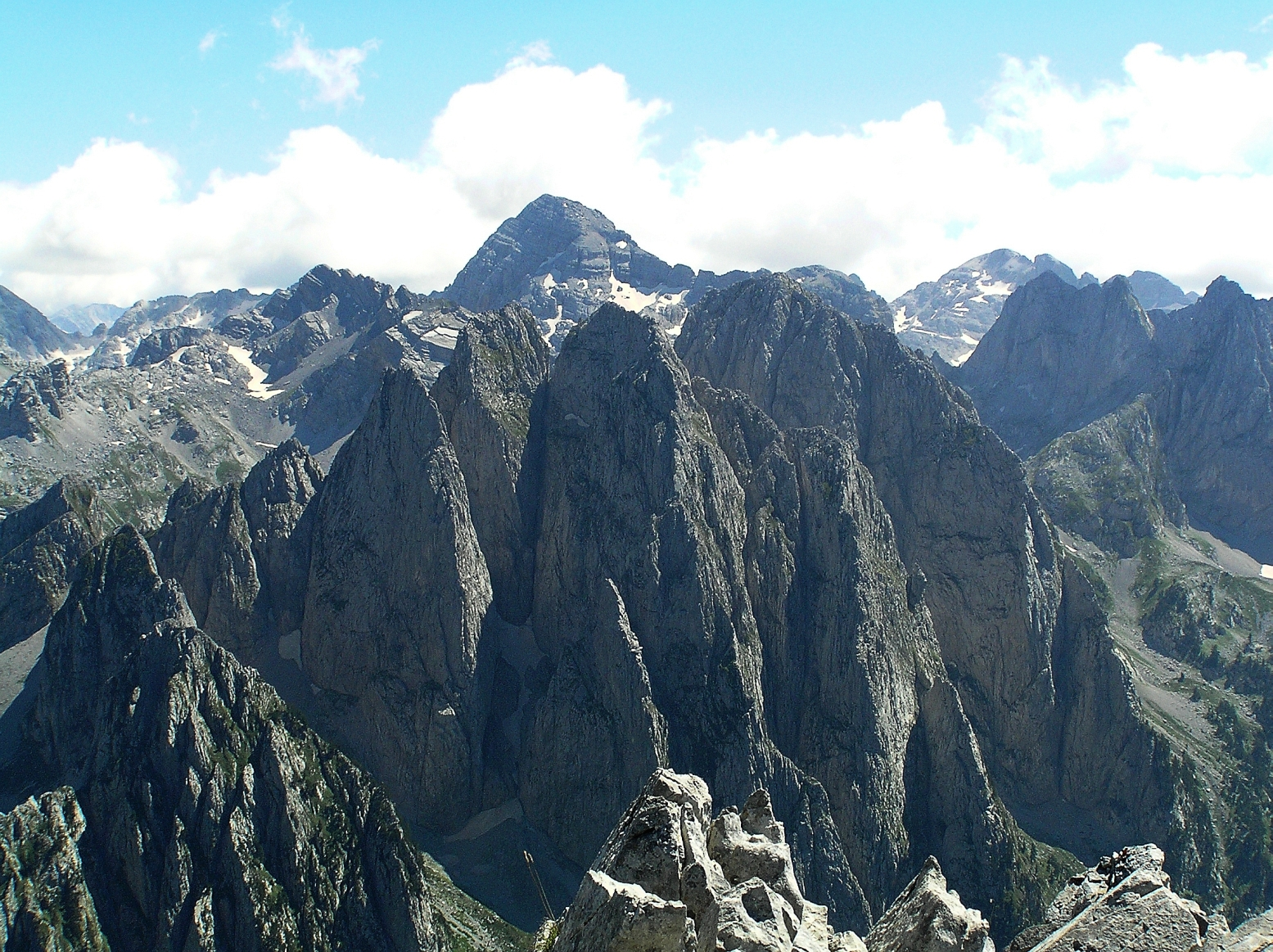 Jezerski Vrh (2694) in Prokletije seen from top of Karanfili (2480 m)